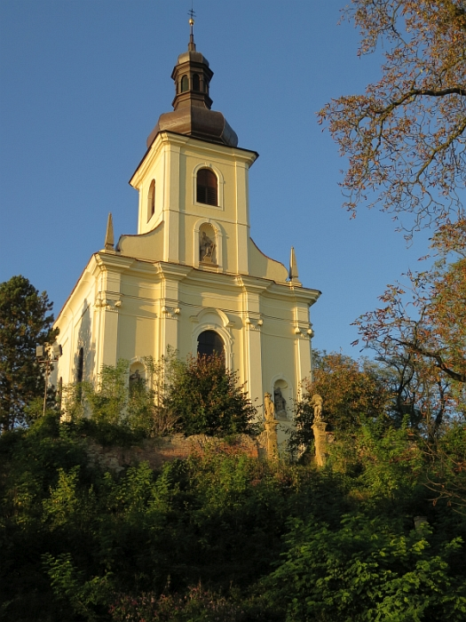 Kostel svatého Mikuláše, východní část vsi, ostrožna, Horky nad Jizerou.